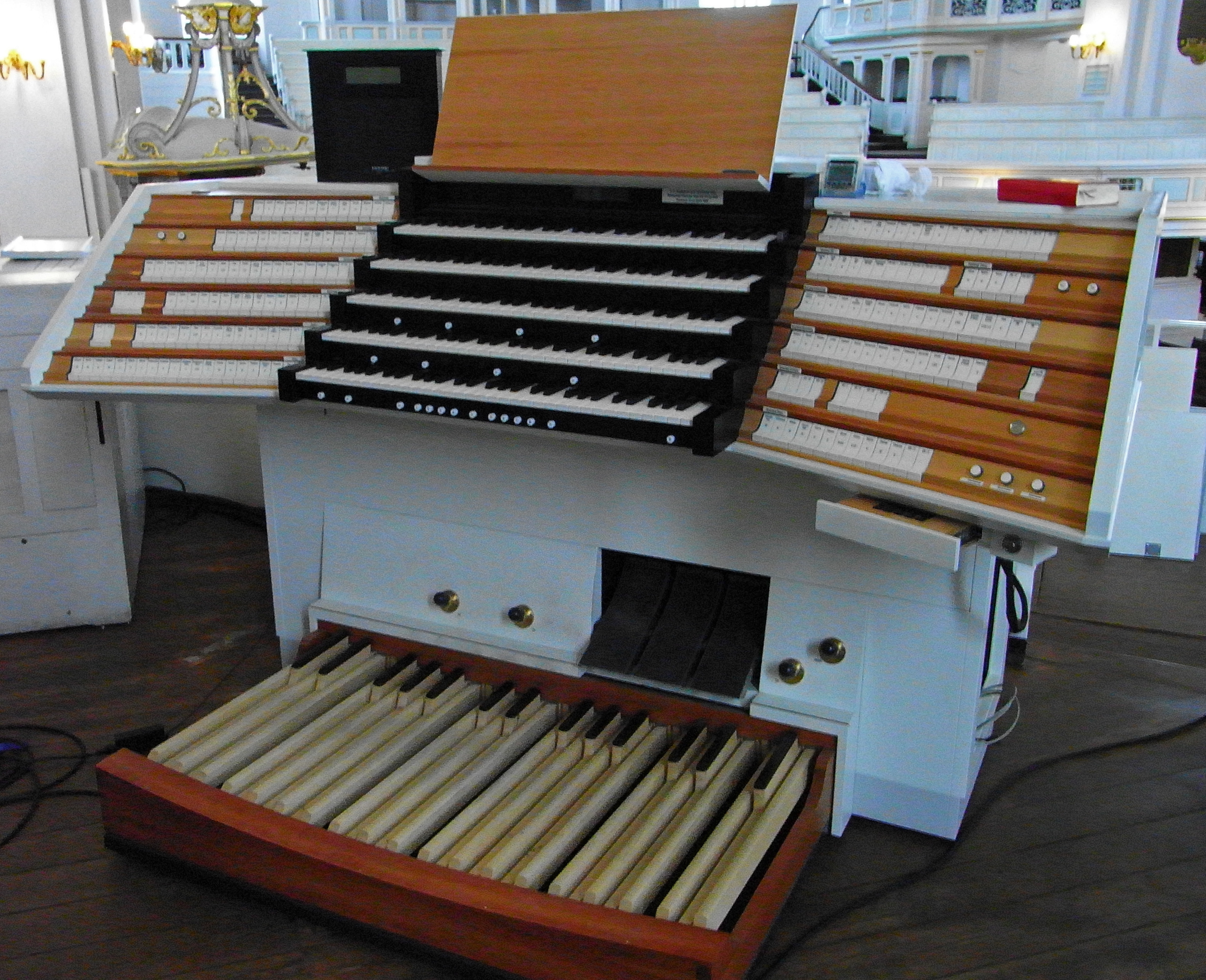 Spieltisch der Steinmeyer-Orgel in Sankt Michaelis, Hamburg